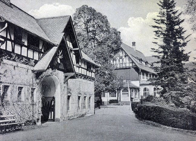 Gut Calmuth, Remagen, ehemaliger Sitz der Internationalen Film-Union